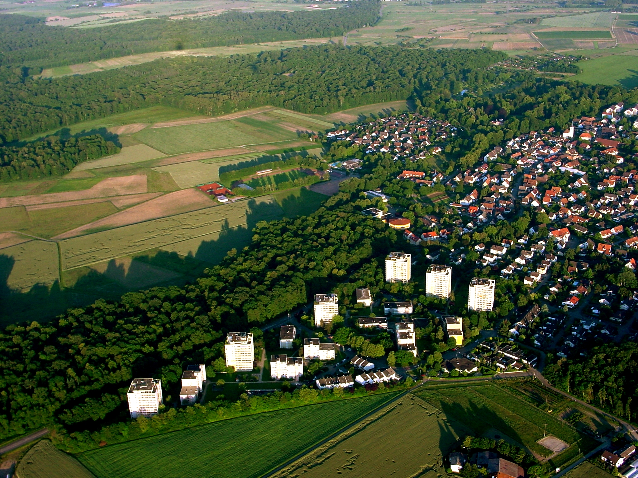 Luftbild von Umkirch aufgenommen bei einer Ballonfahrt